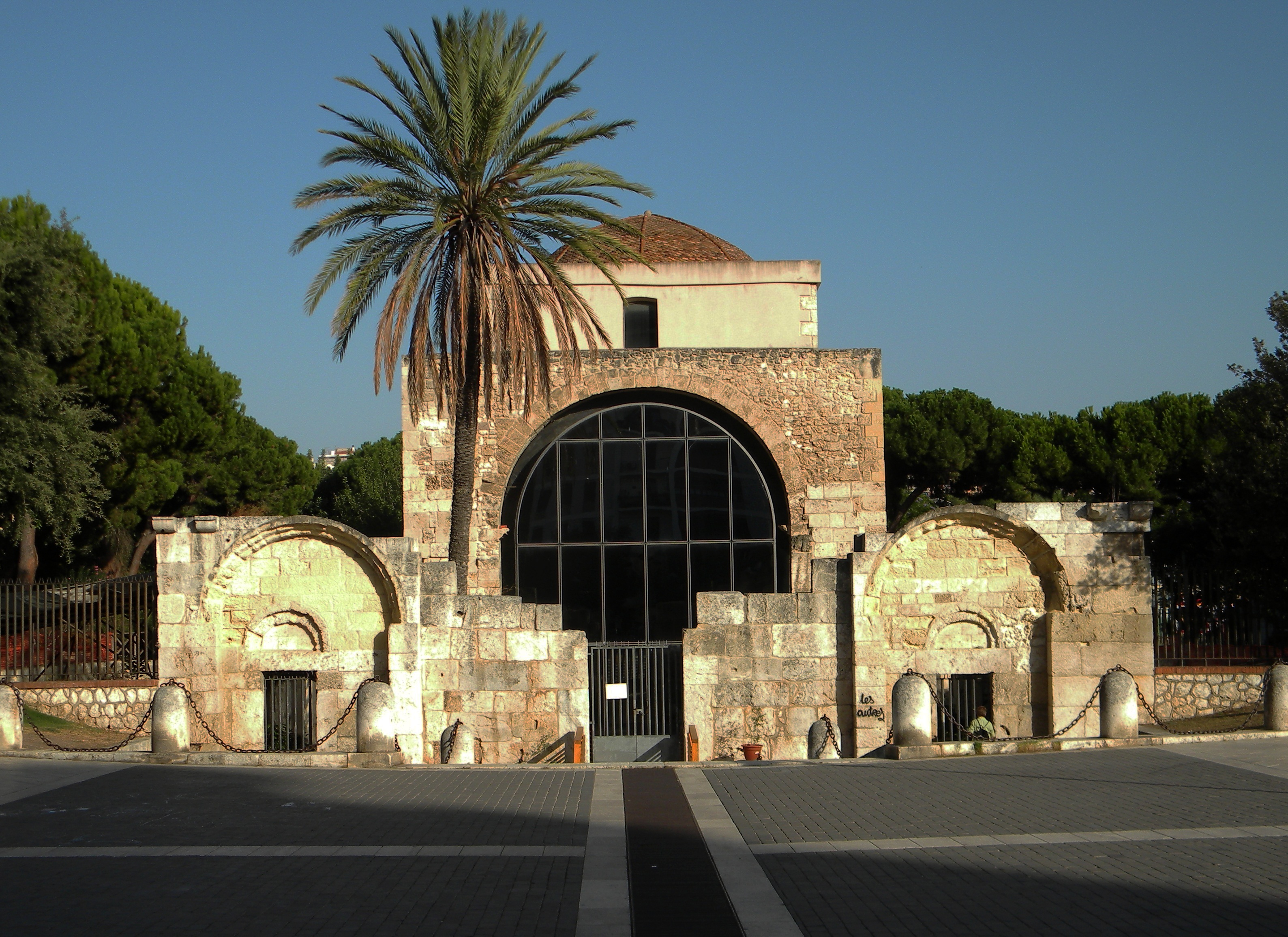 Basilica di San Saturnino - MIBAC This is a photo of a monument which is part of cultural heritage of Italy.